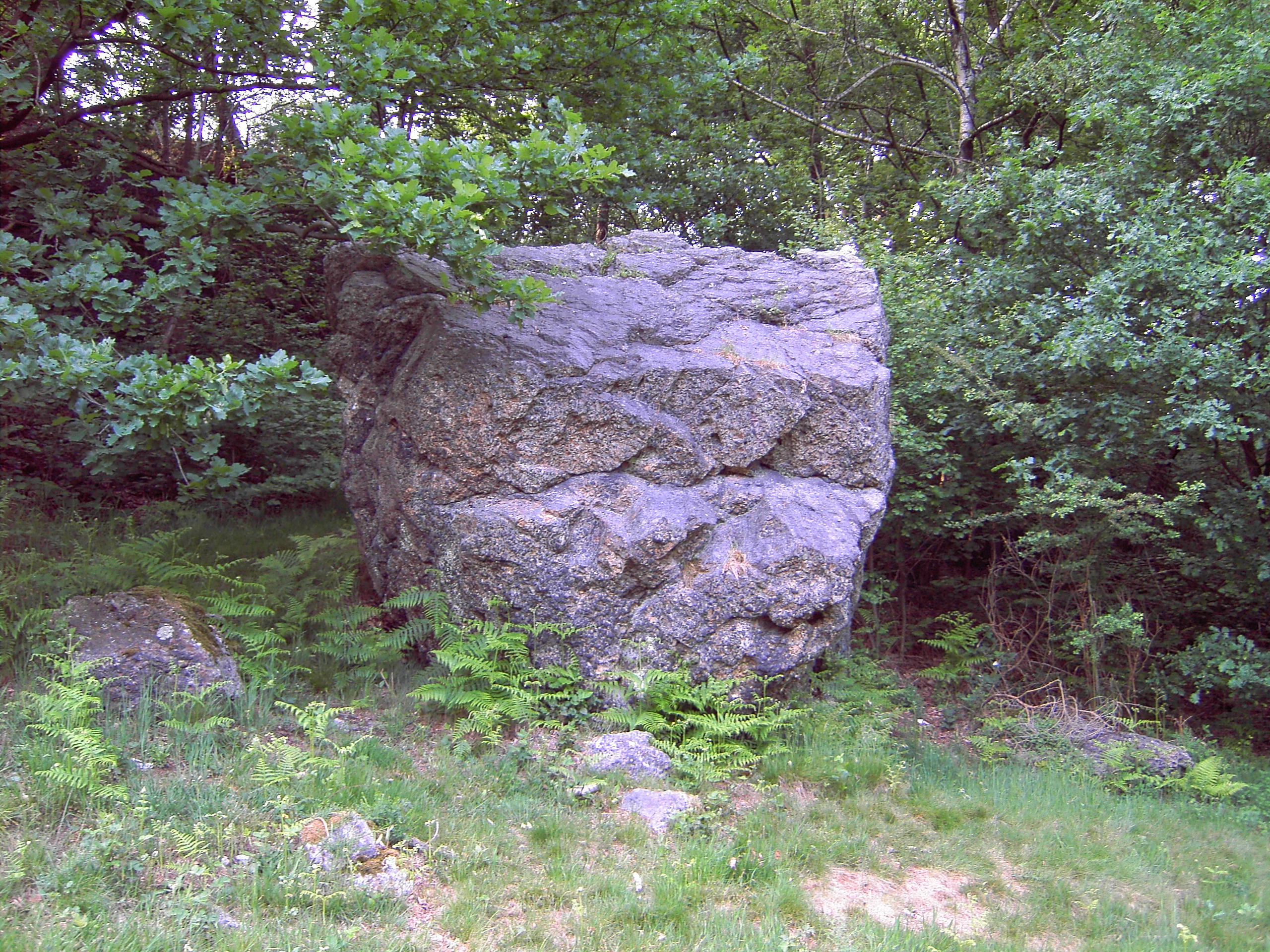 Stein aus Gedauer Konglomerat